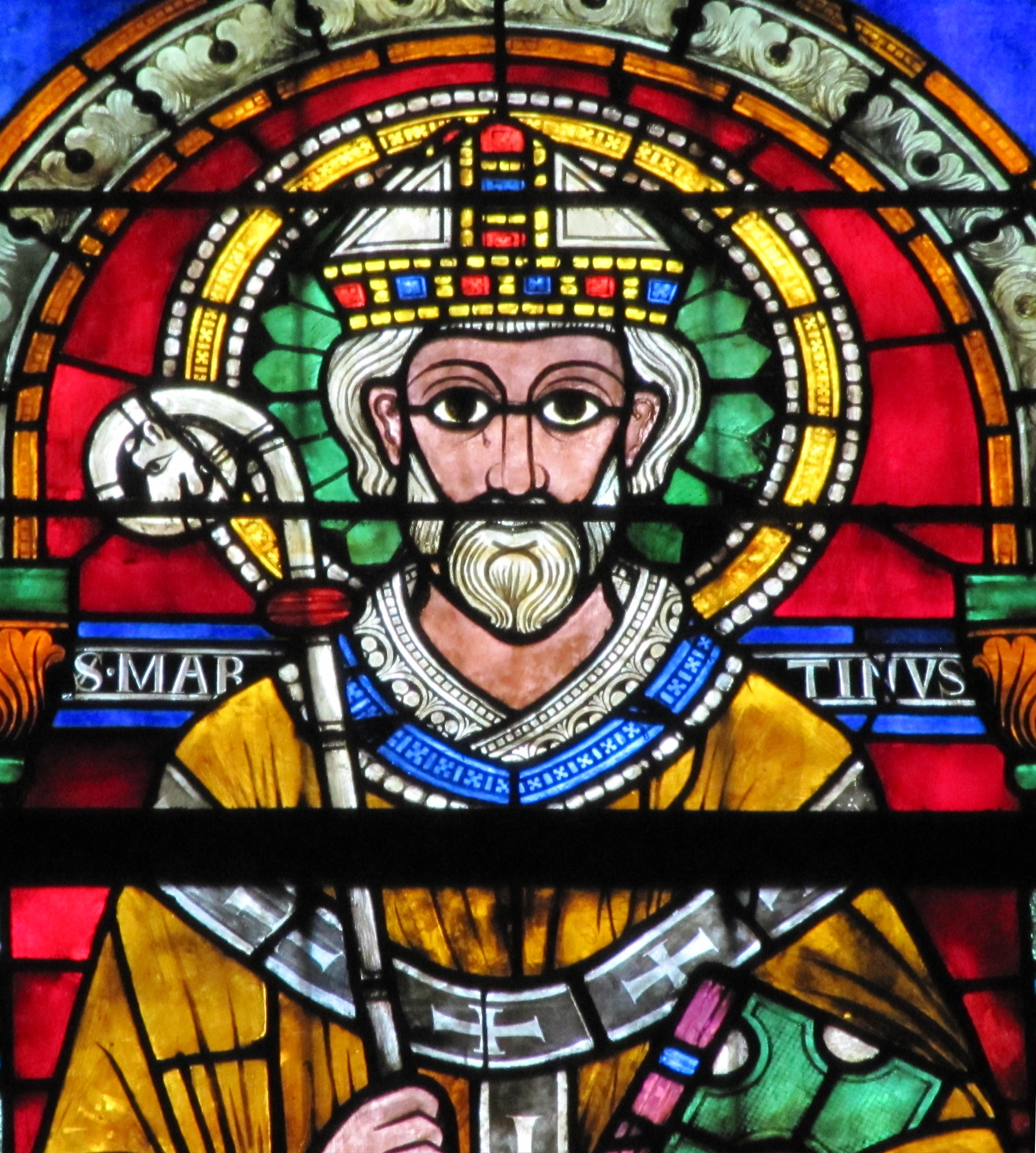 Alsace, Bas-Rhin, Cathédrale Notre-Dame de Strasbourg (PA00085015).Croisillon nord: Verrière "Saint-Martin" (XIIe)